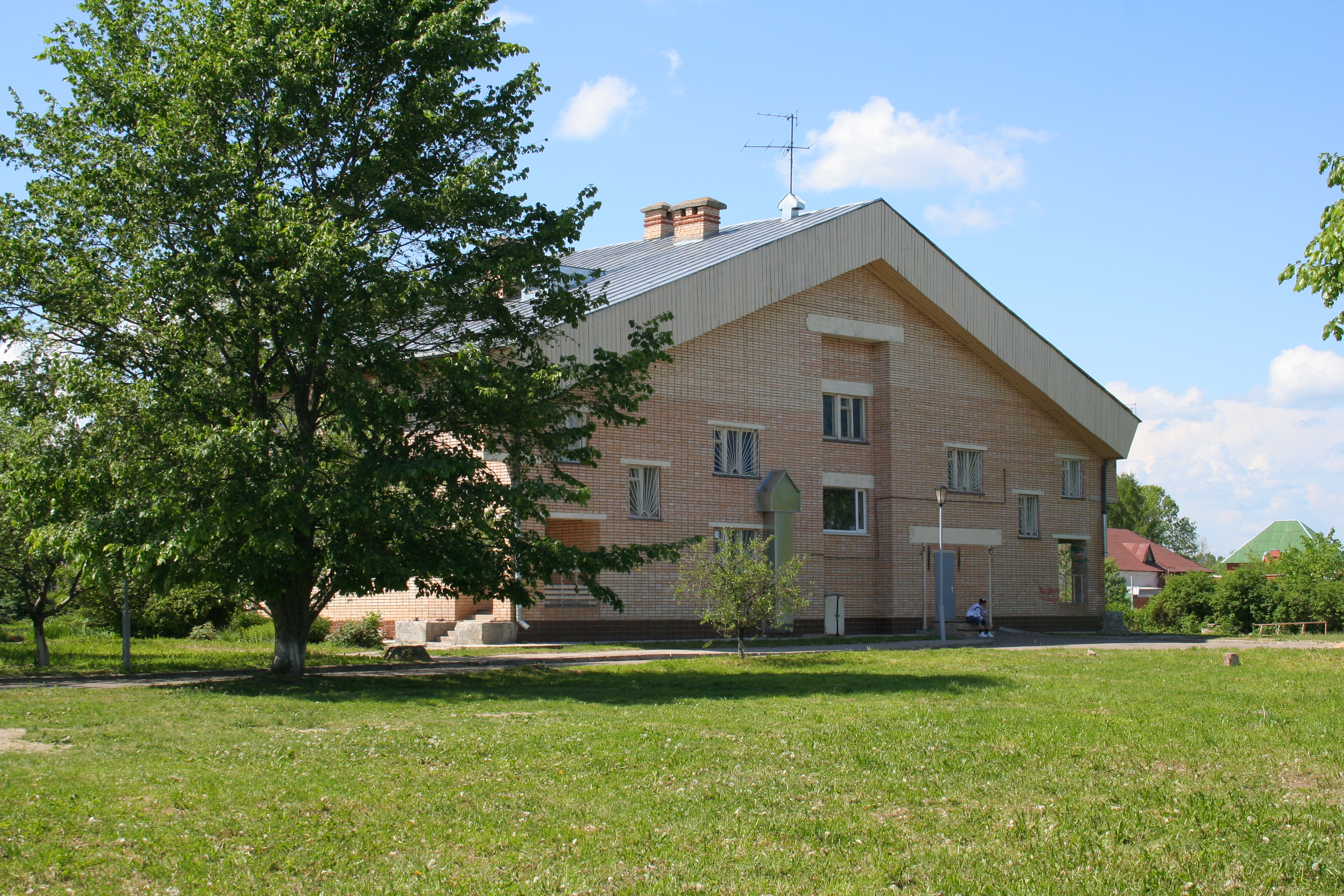 Stadt Gagarin (ehem. Gschatsk), Oblast Smolensk, Russland. Museumskomplex zu Ehren Juri Gagarins. Haus der Kosmonauten.